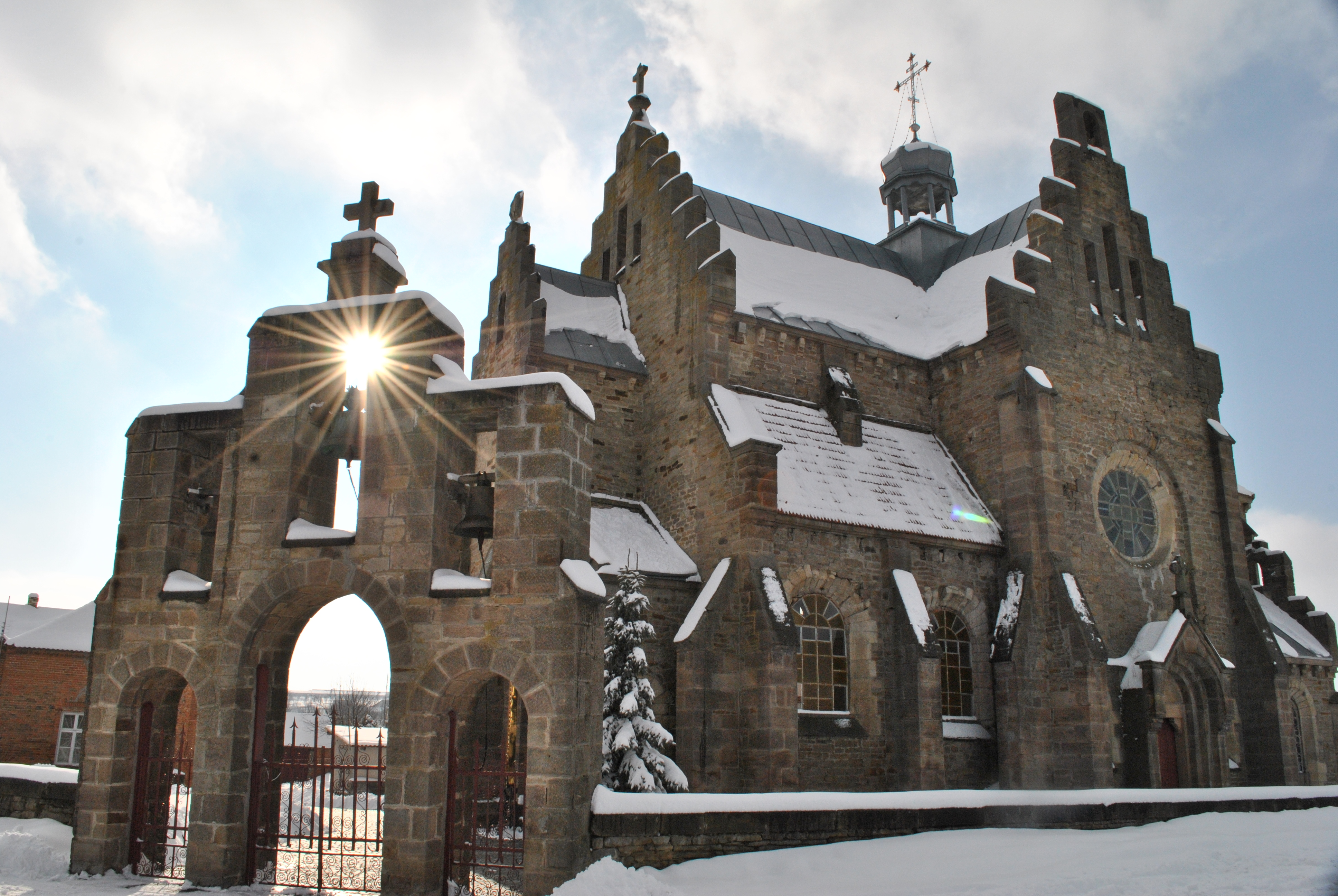 Церква святих апостолів Петра і Павла УПЦ КП (колишній костел) у селі Буцневі Тернопільського району Тернопільської області (Україна).